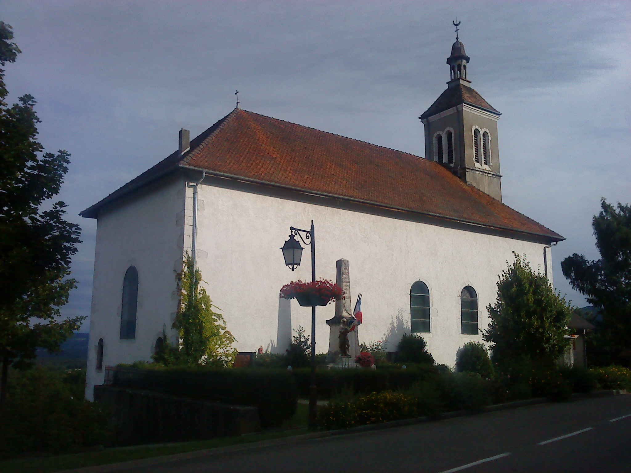 Église Saint-Brice de Farges, Ain, France